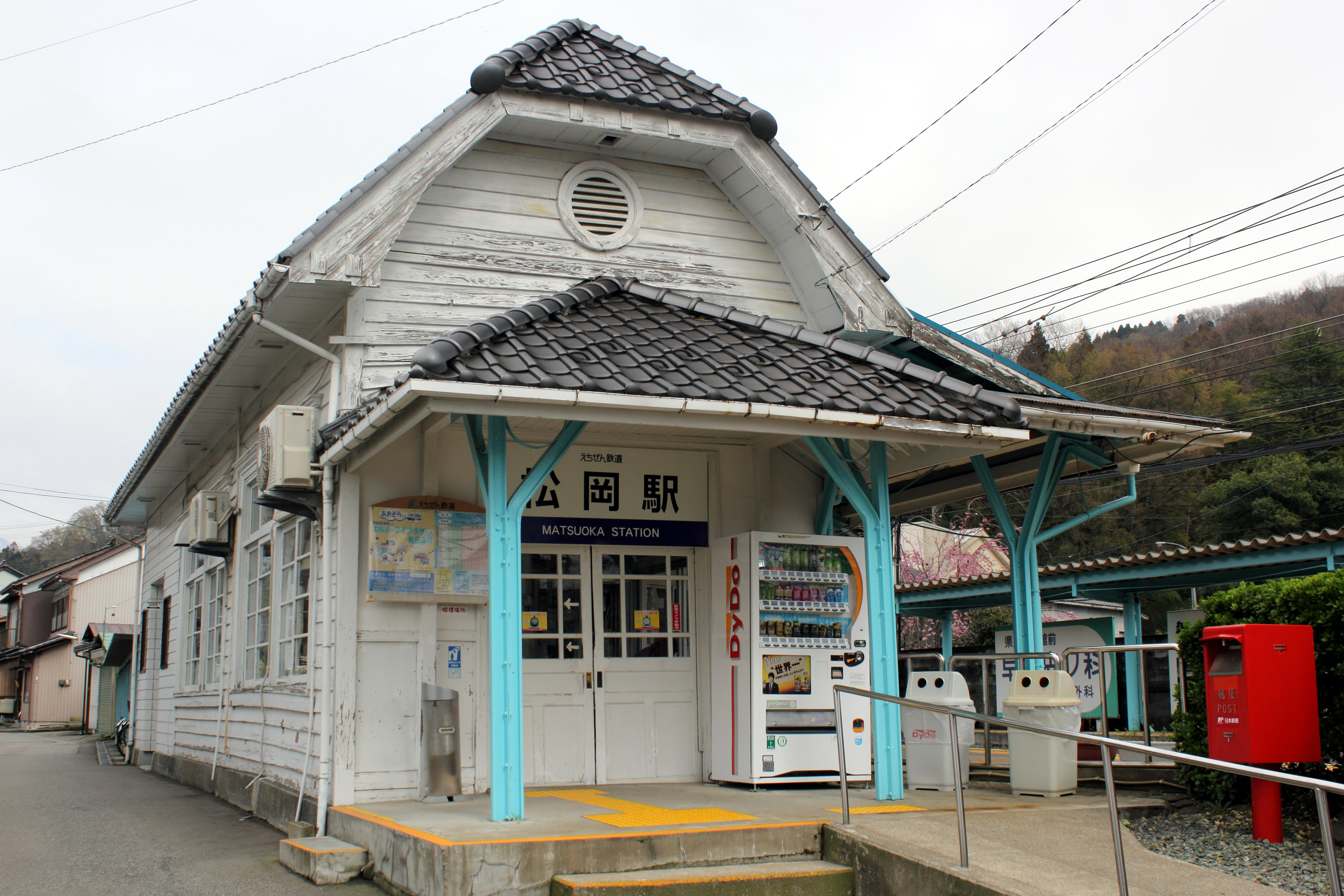 えちぜん鉄道松岡駅 2015年